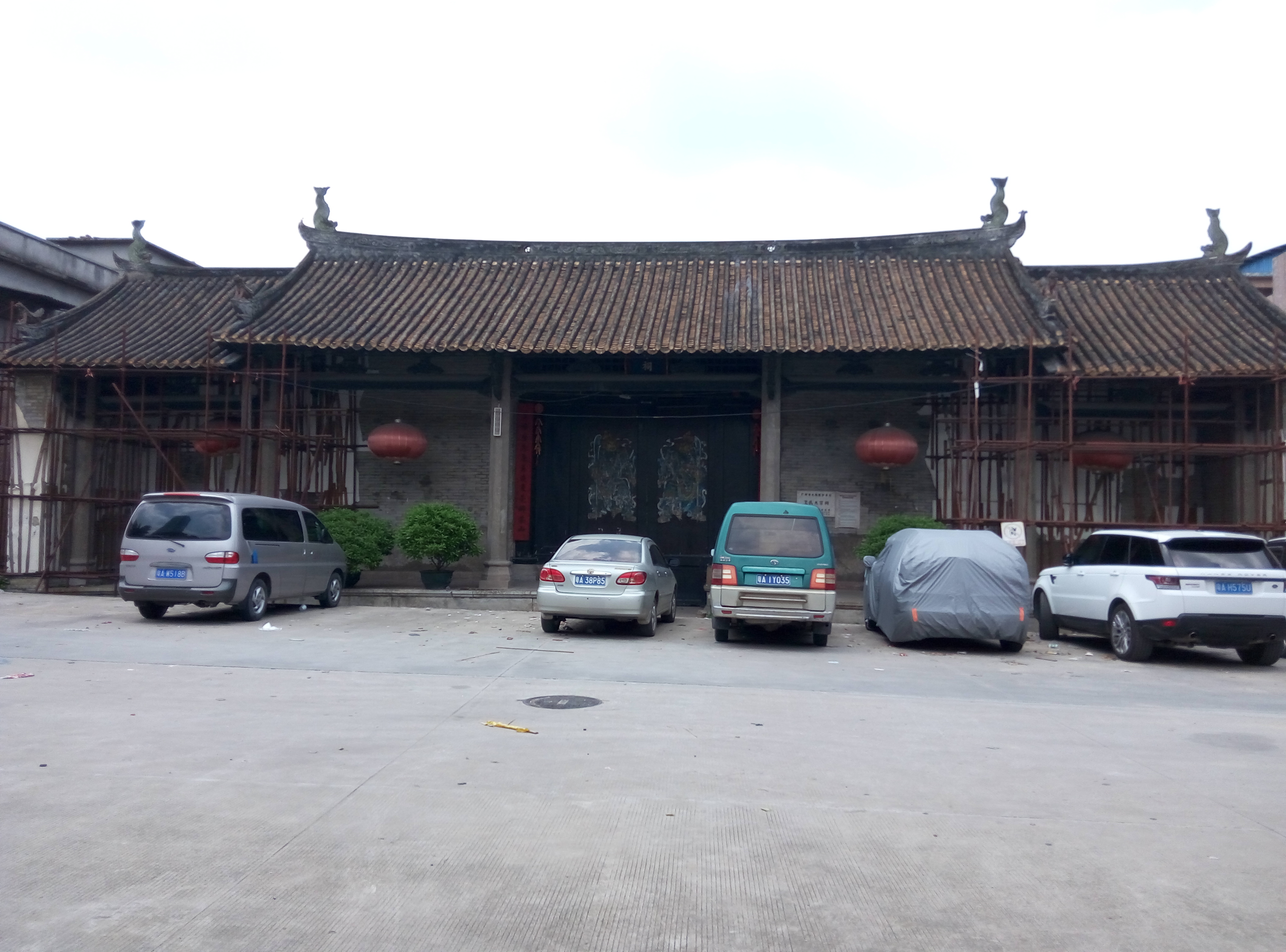 粵語: 瀝滘，慶源堂